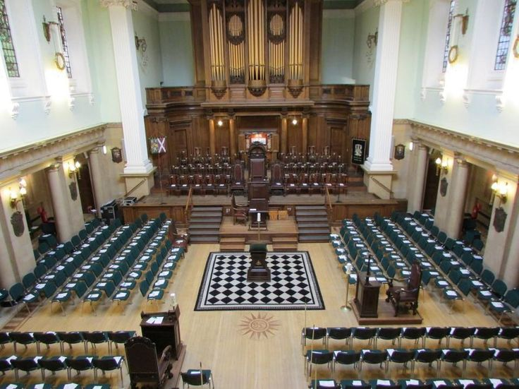 templo